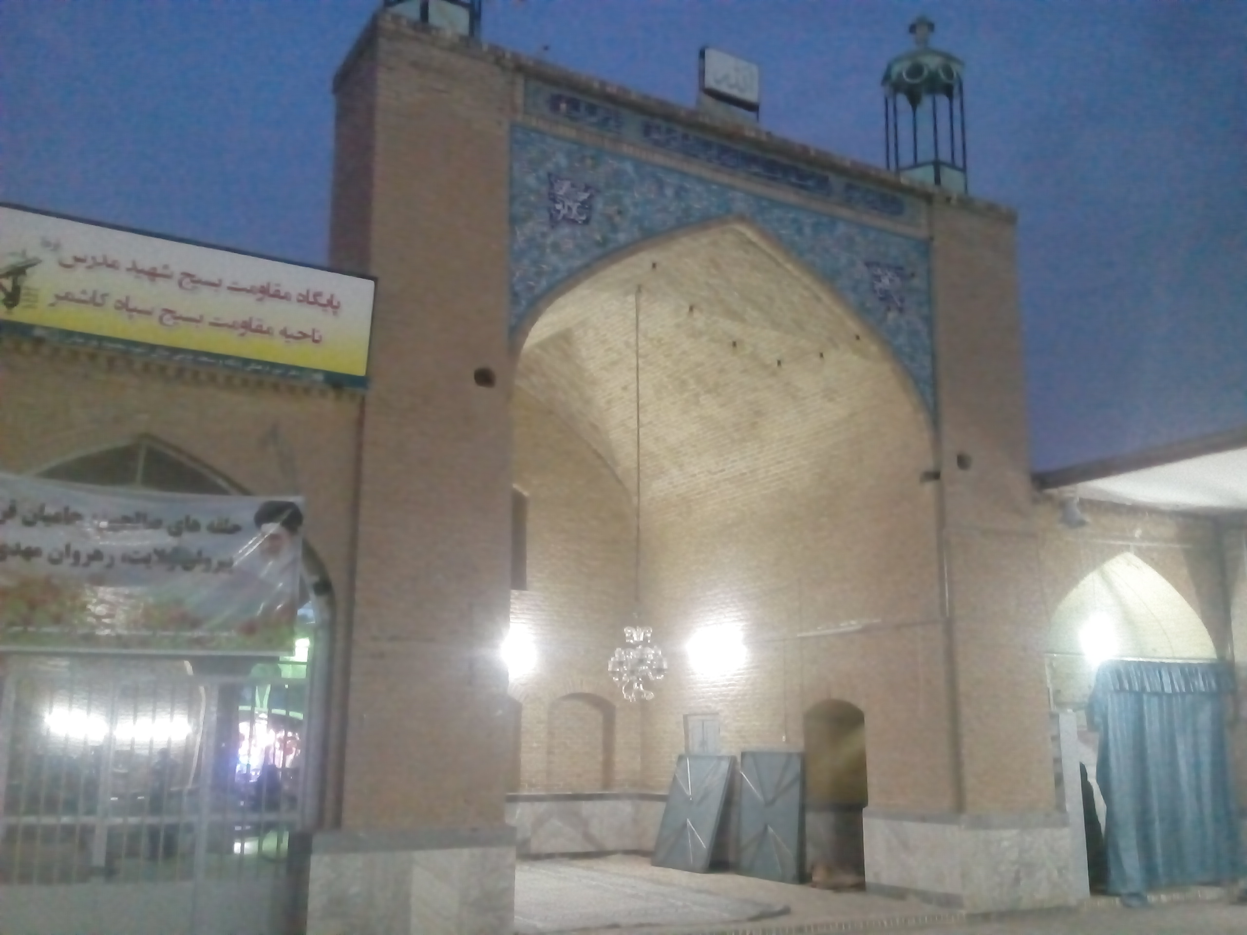 مسجد حاجی جلال